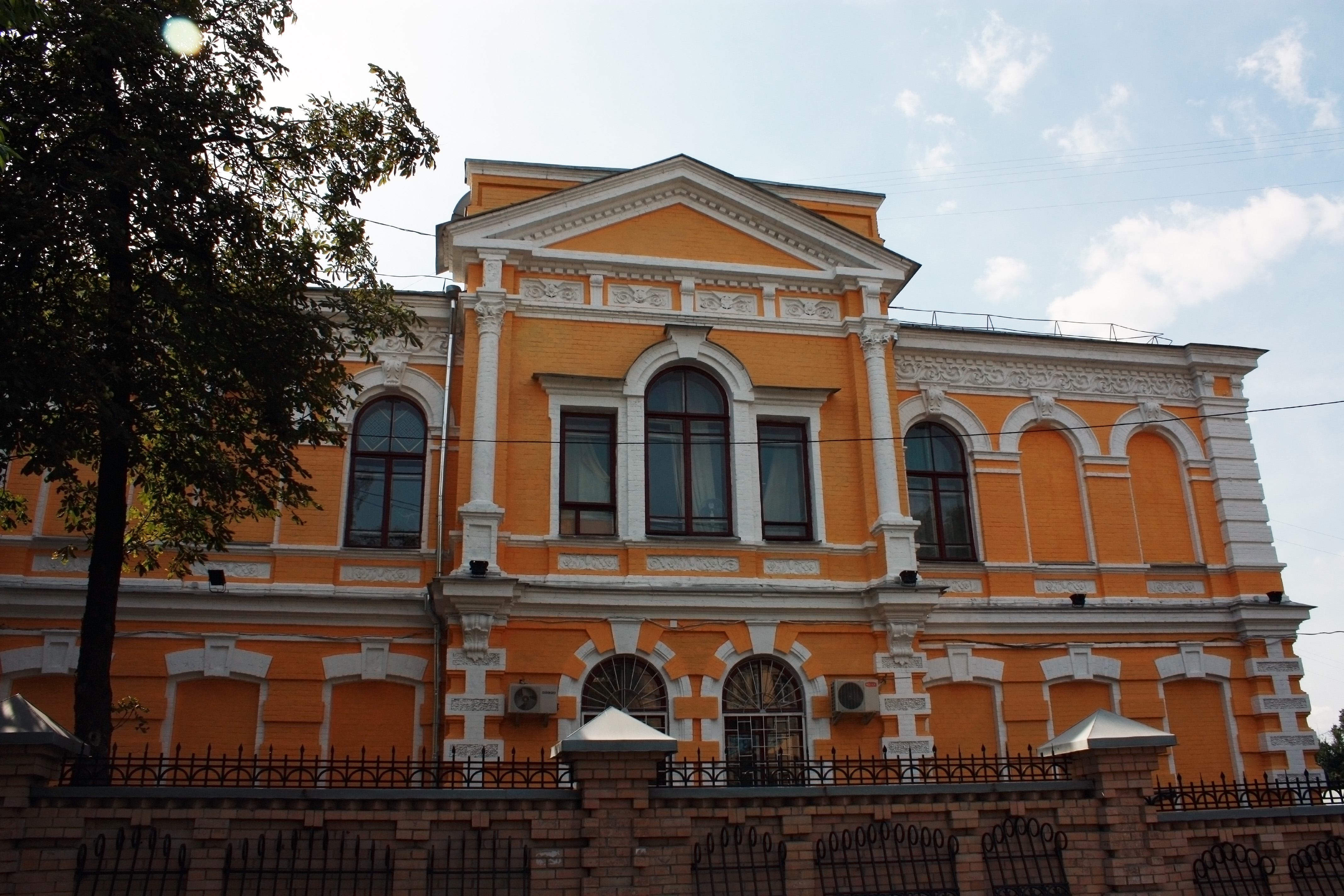 Київ, вул. Червоноармійська, 96